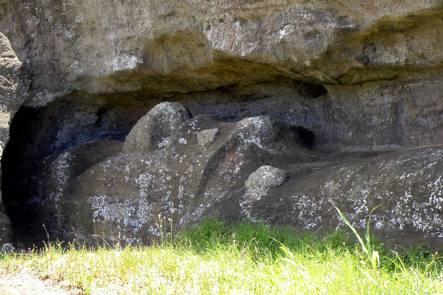 Angefangener aber unfertiger Moai im Fels des Kraters Rano Raraku